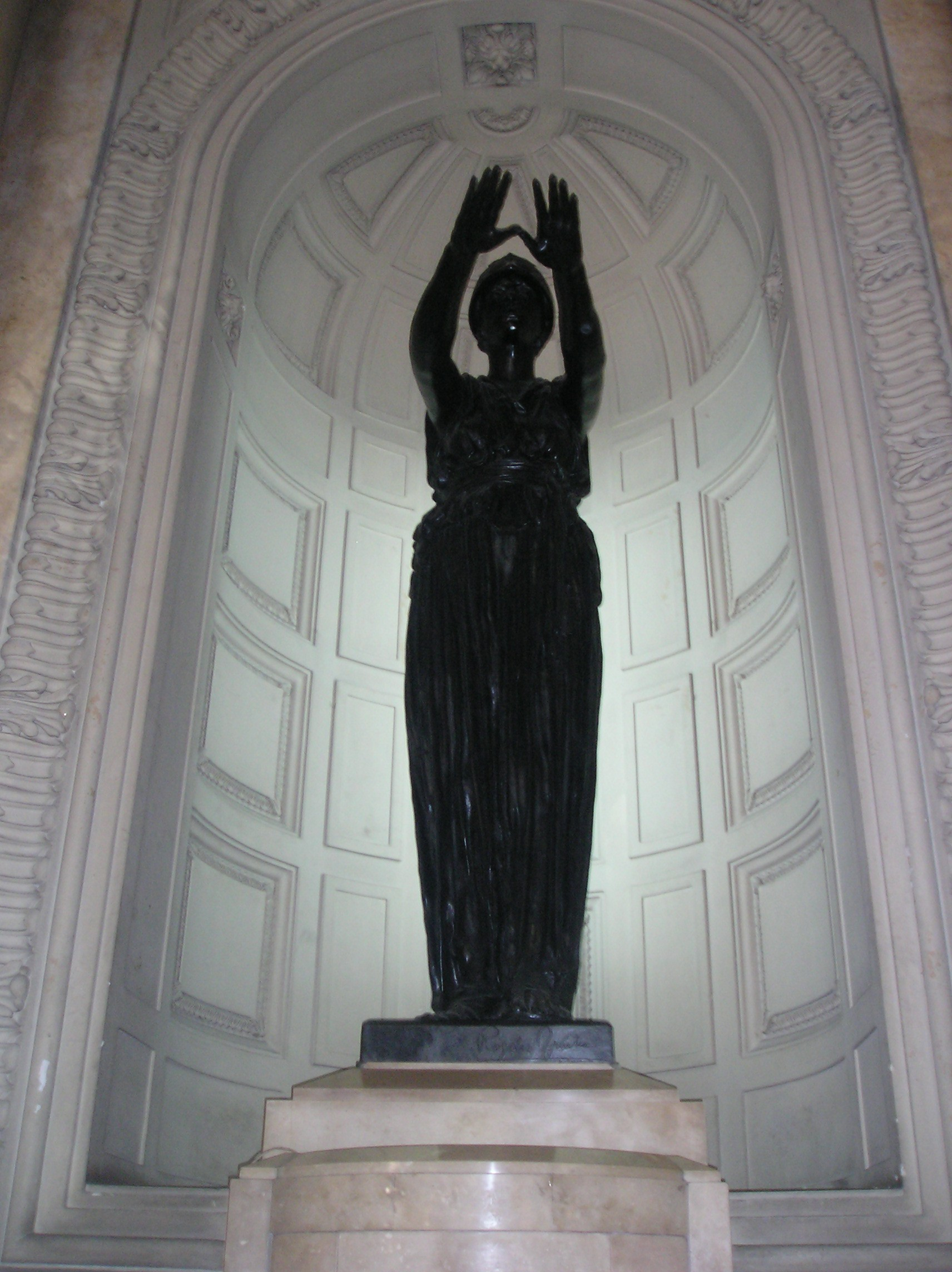 "La Justicia", escultura del escultor argentino Rogelio Yrurtia. Ubicada en el hall de entrada del Palacio de Justicia, Talcahuano 550, Ciudad de Buenos Aires. "The Justice", sculture made by Argentinean Rogelio Yrurtia. Located in the entrance hall of the Justice Palace, Talcahuano Street 550, Buenos Aires City.